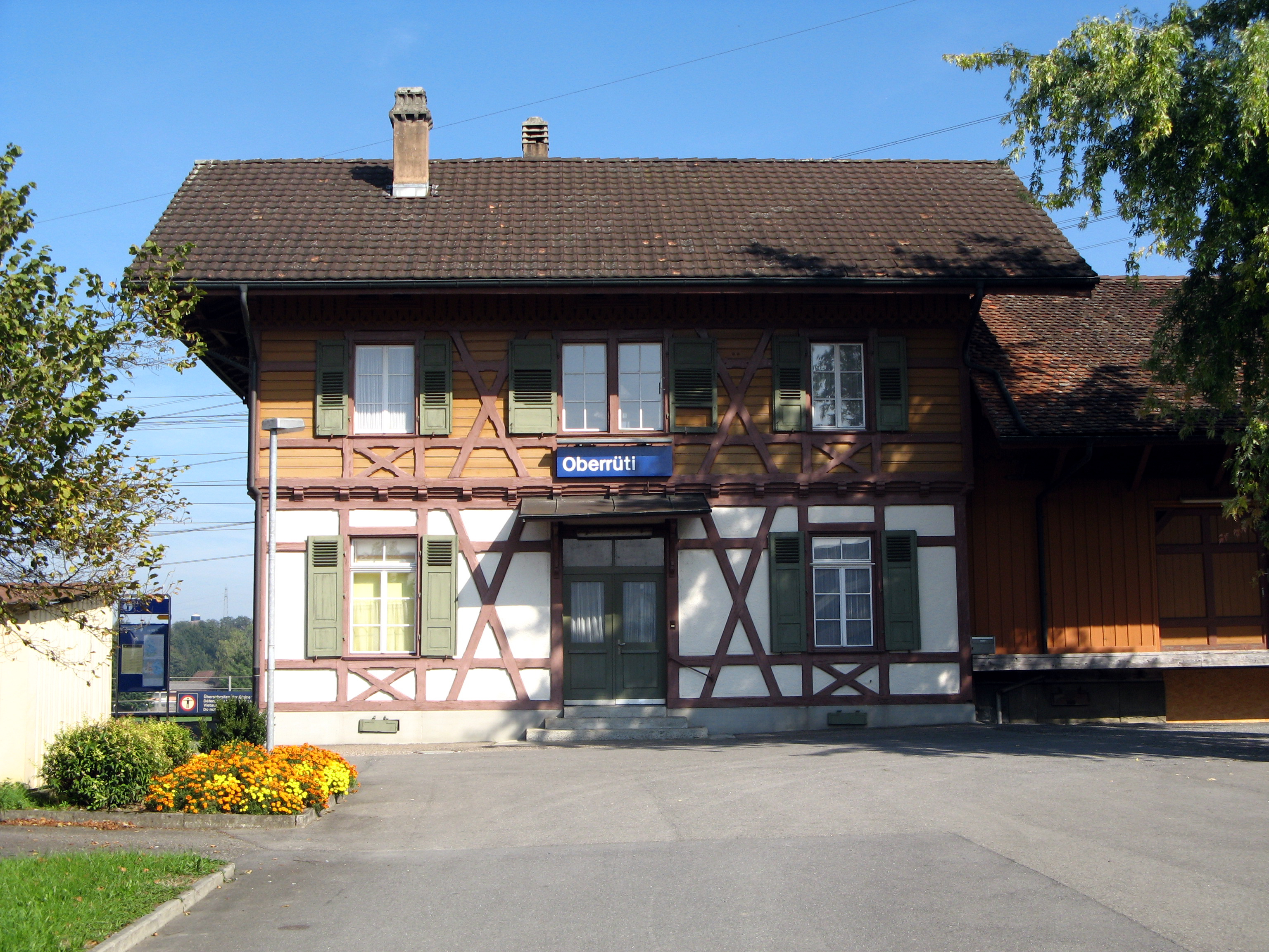 Bahnhof Oberrüti